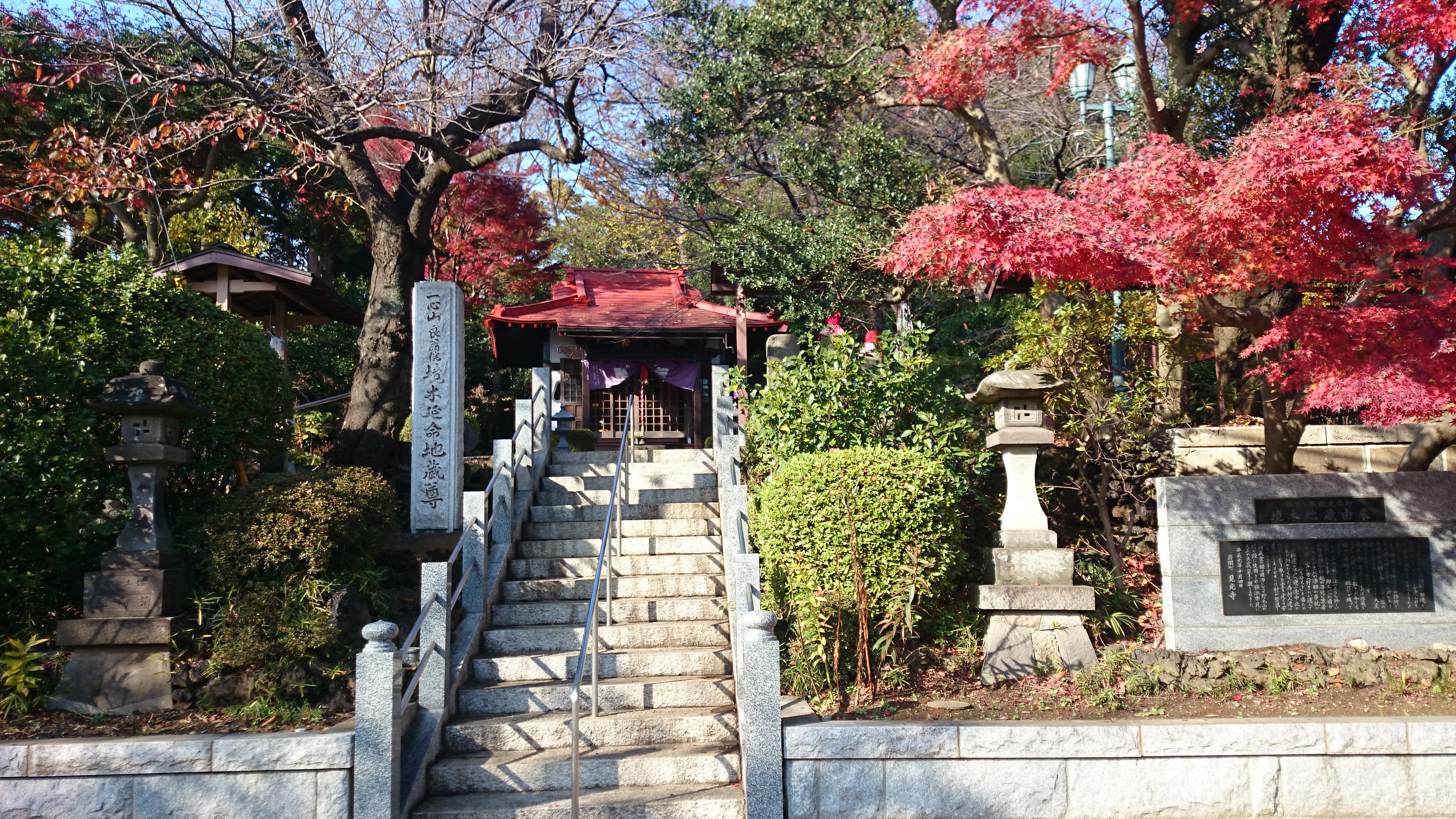 境木地蔵横浜市保土ヶ谷区 NTTドコモ Xperia Z1fにて撮影